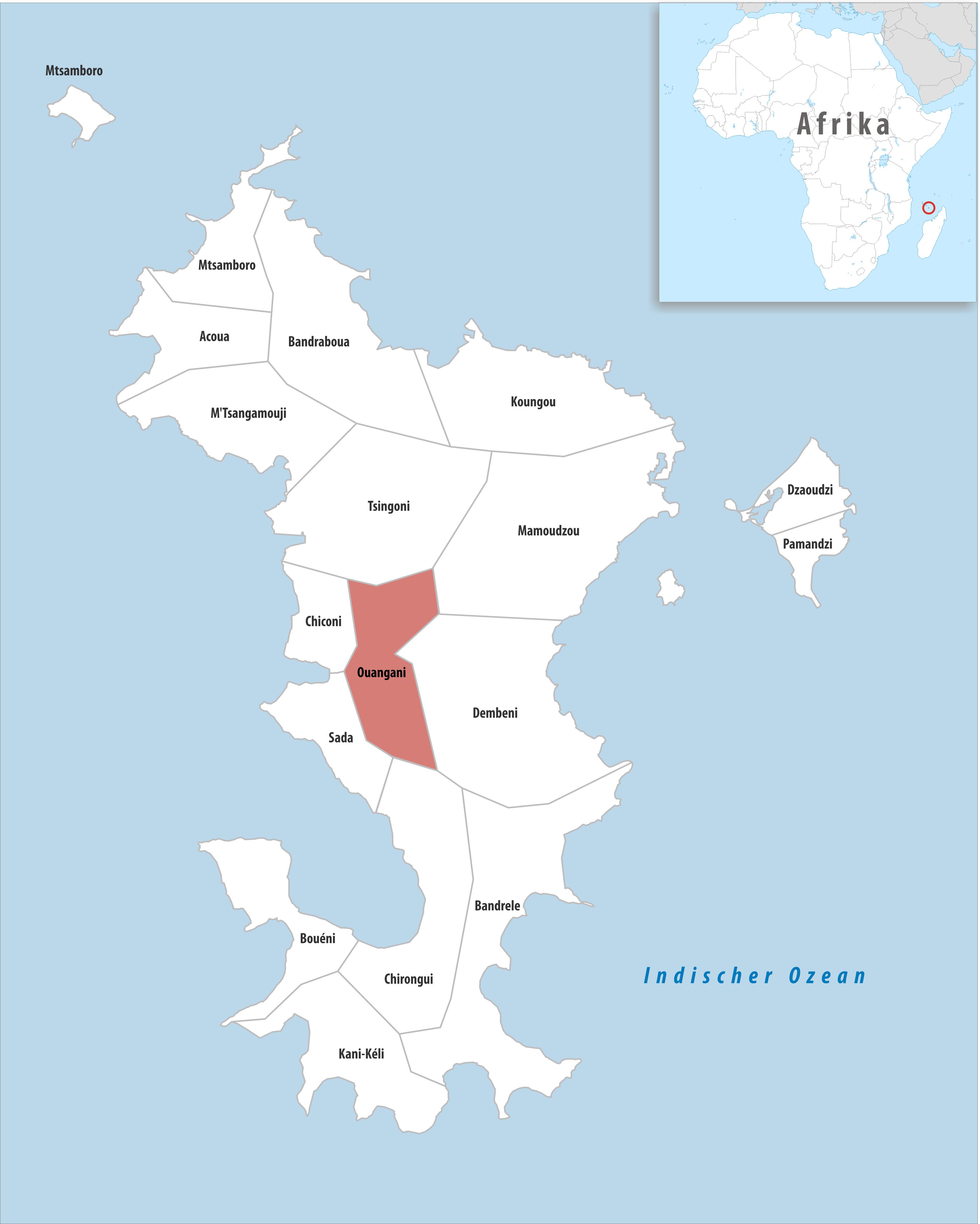 Lage der Gemeinde Ouangani